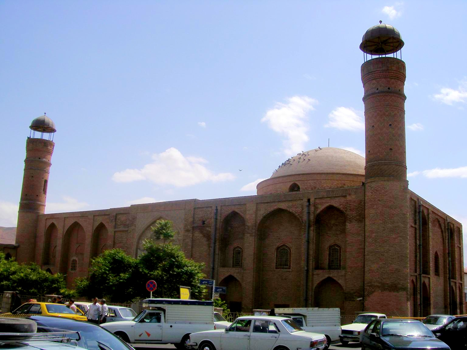 Saheb ol Amr Mosque, Tabriz, Iran